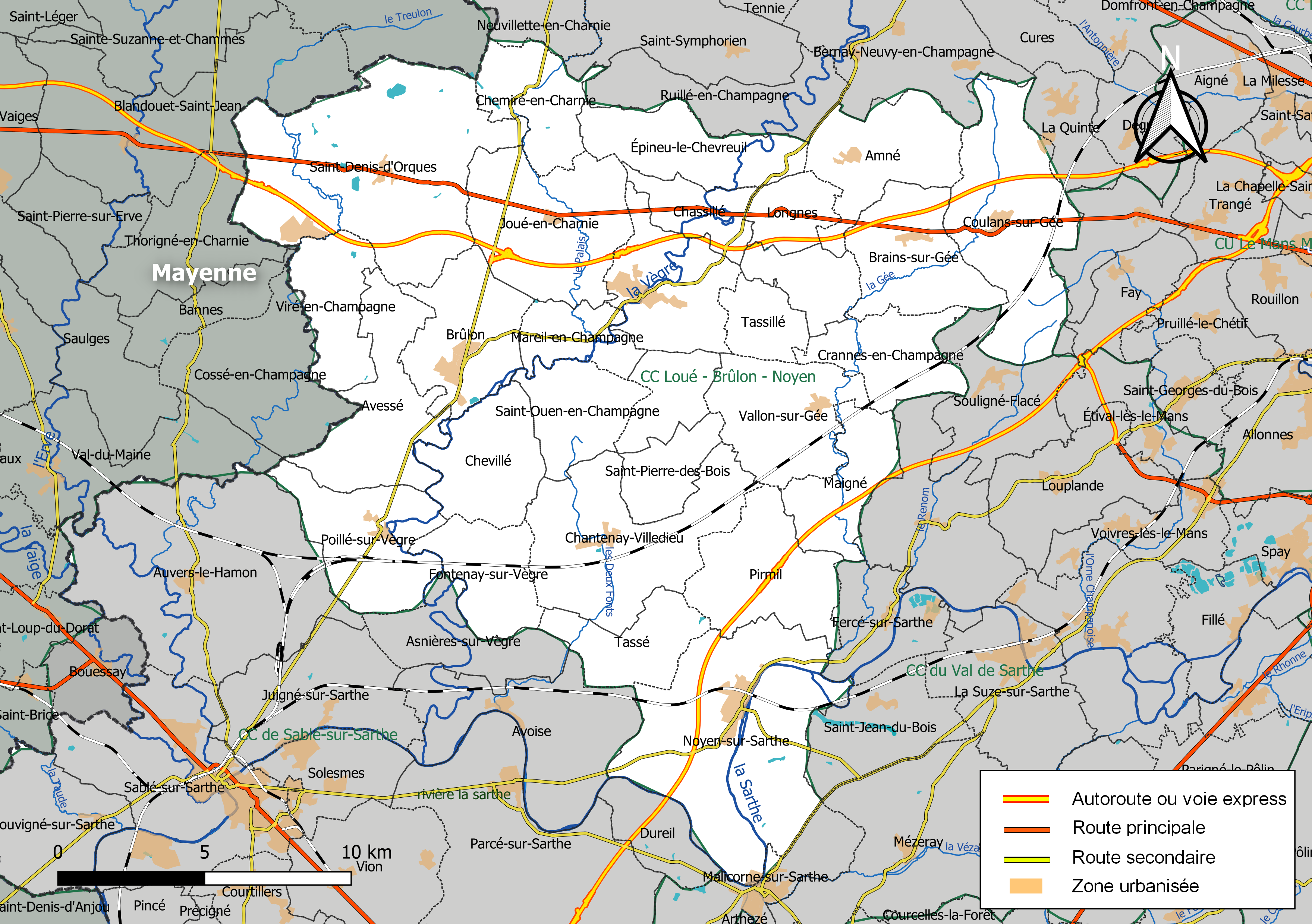 Carte géographique de la Communauté de communes Loué-Brûlon-Noyen, département de la Sarthe, France. Composition au 1er janvier 2019.